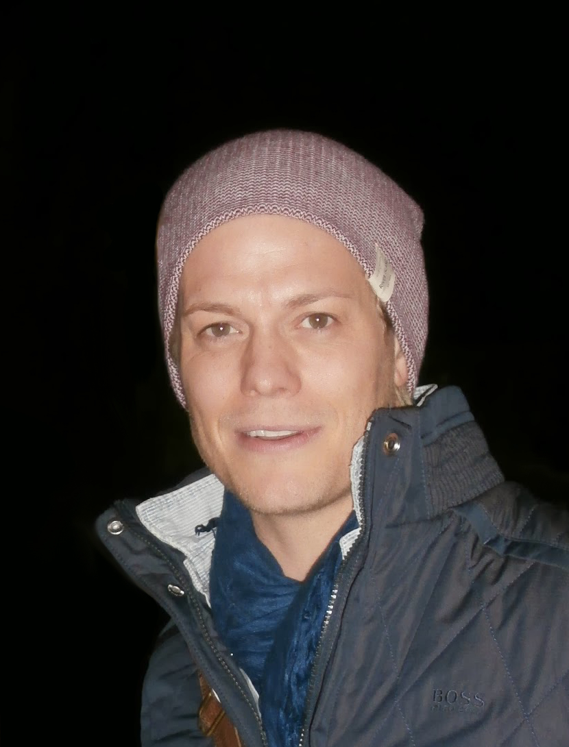 Mark Seibert nach der nahezu letzten Vorstellung von Elisabeth im Raimund Theater in Wien. (Januar 2014)